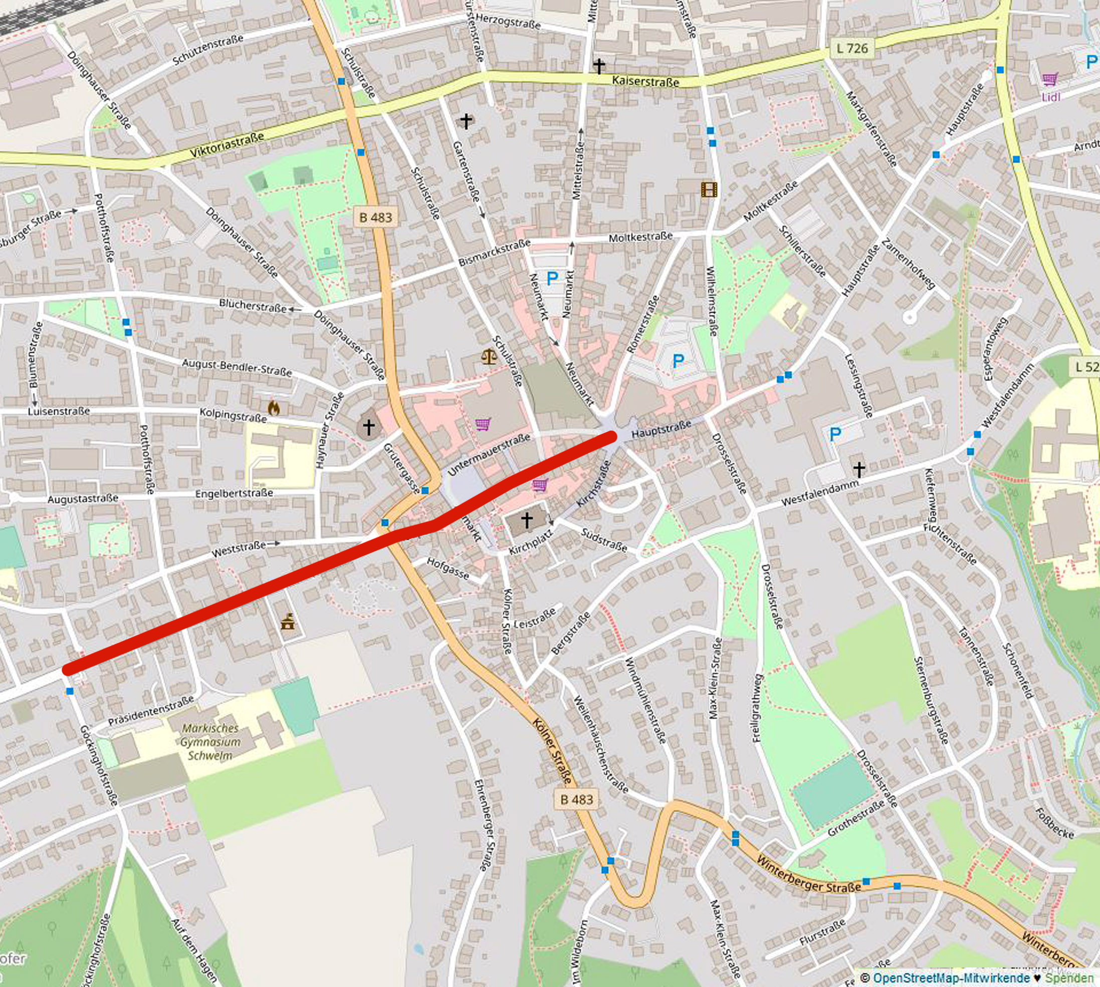 Lage von Bau- und Bodendenkmälern in Schwelm, rot markiert der Bereich Barmer Straße, Hauptstraße (westlicher Teil) und Untermauerstraße. (Links außerhalb ergänzt sich noch das Baudenkmal Barmer Straße 47.) Kartenvorlage aus OpenStreetMap wurde um Markierung (rot) ergänzt.